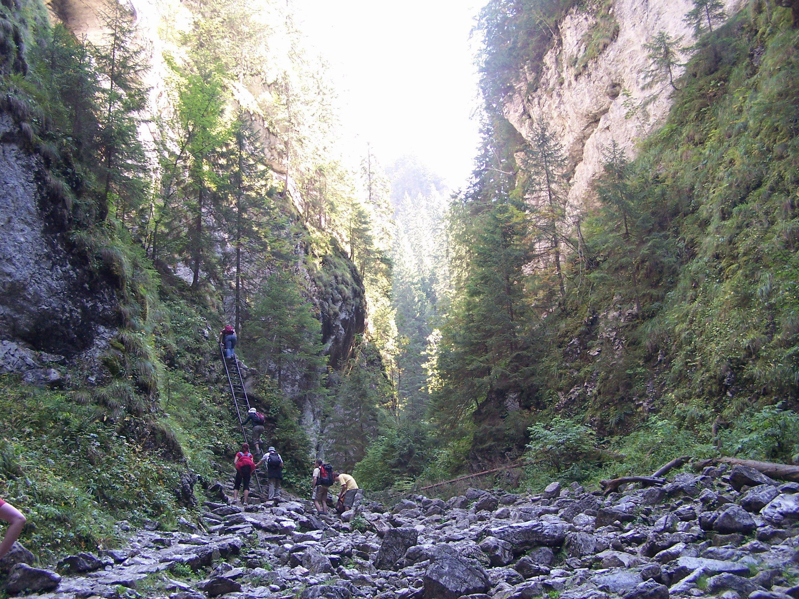 Wąwóz Kraków (Tatra Mountains, Dolina Kościeliska)